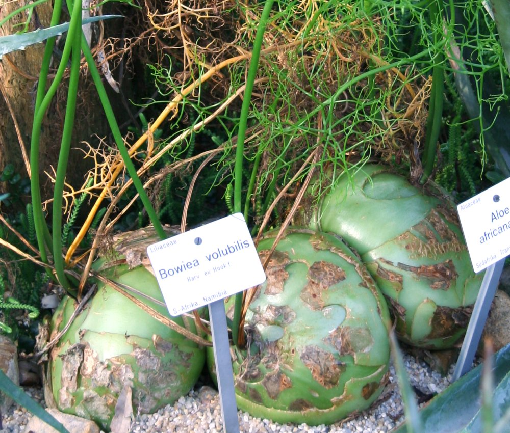 Knollen von Bowiea volubilis